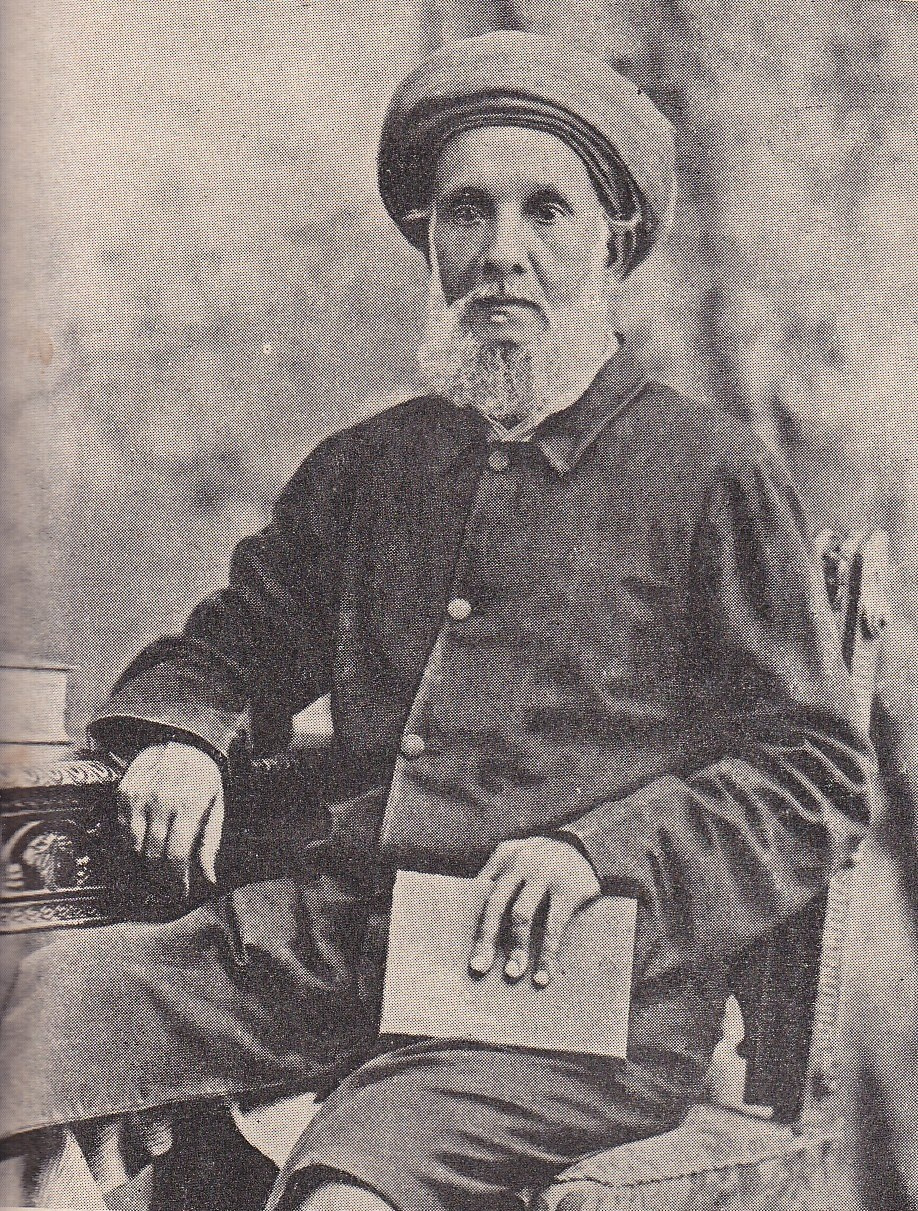 תמונתו של חיים שמואל קהימקר הסופר